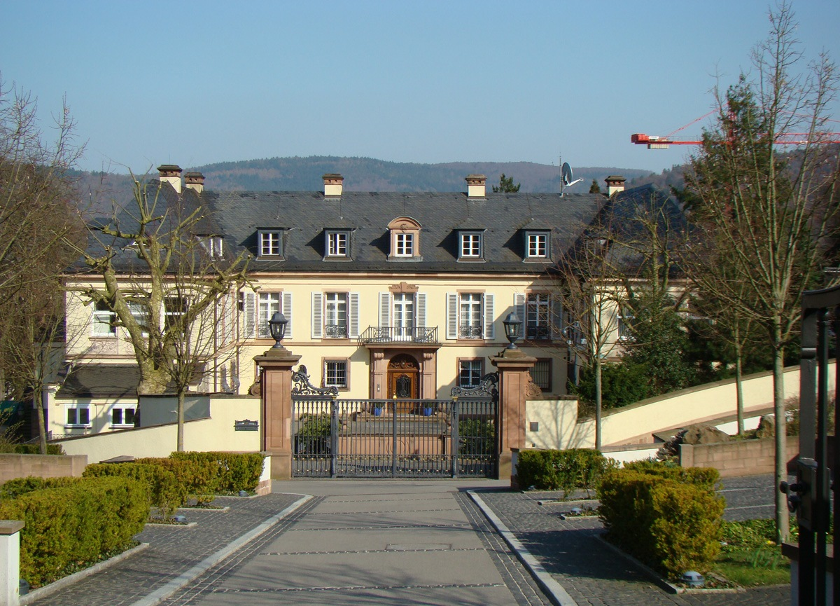 Villa Bosch in Heidelberg, Schloss-Wolfsbrunnenweg 33; erbaut 1921/1922; unter Denkmalschutz